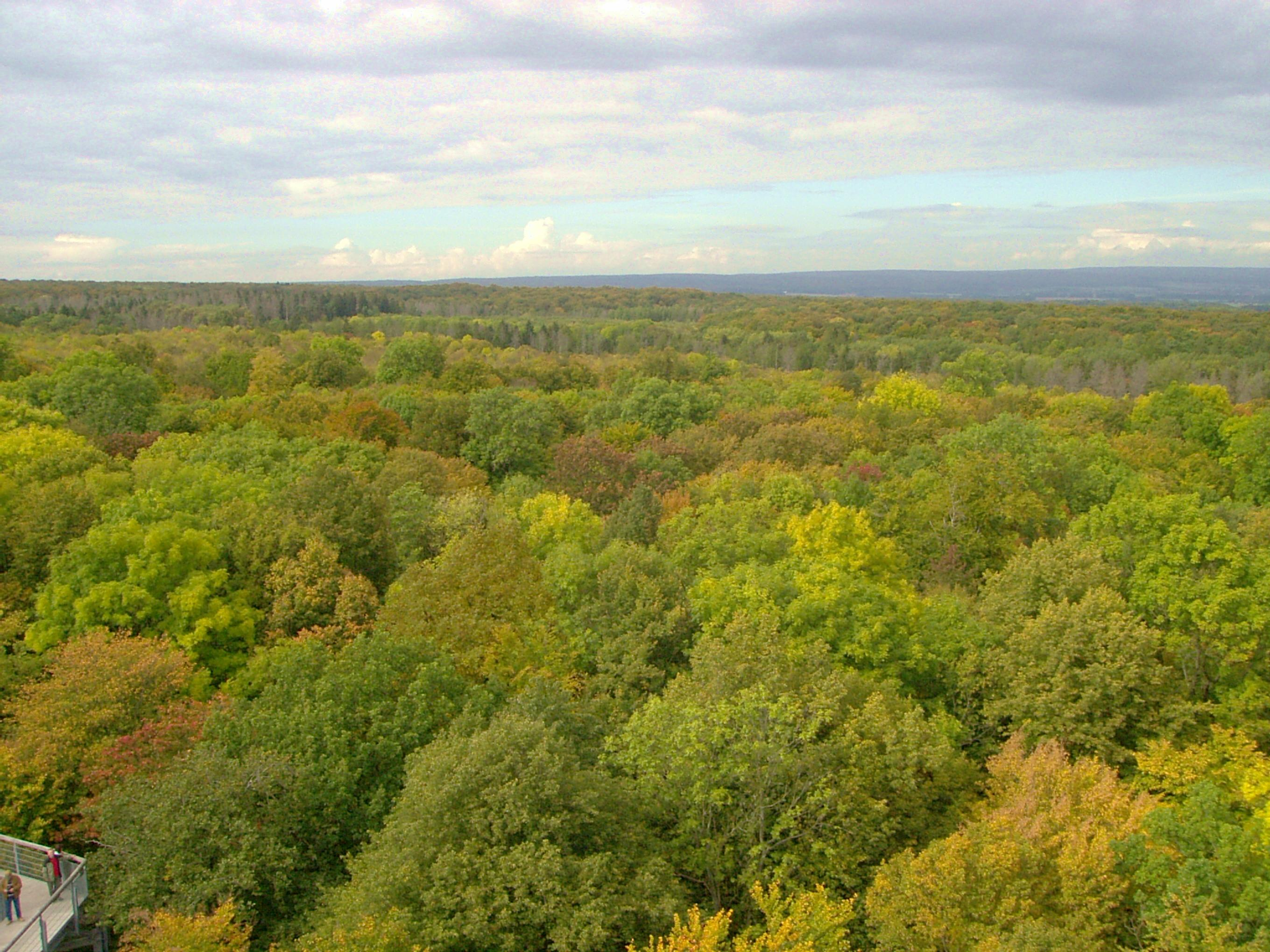 Blick vom "Krähennest" des Baumkronenpfades an der Thiemsburg über das wogende Meer bunter Baumkronen des südlichen Hainich (im Hintergrund der nördliche Hainich).